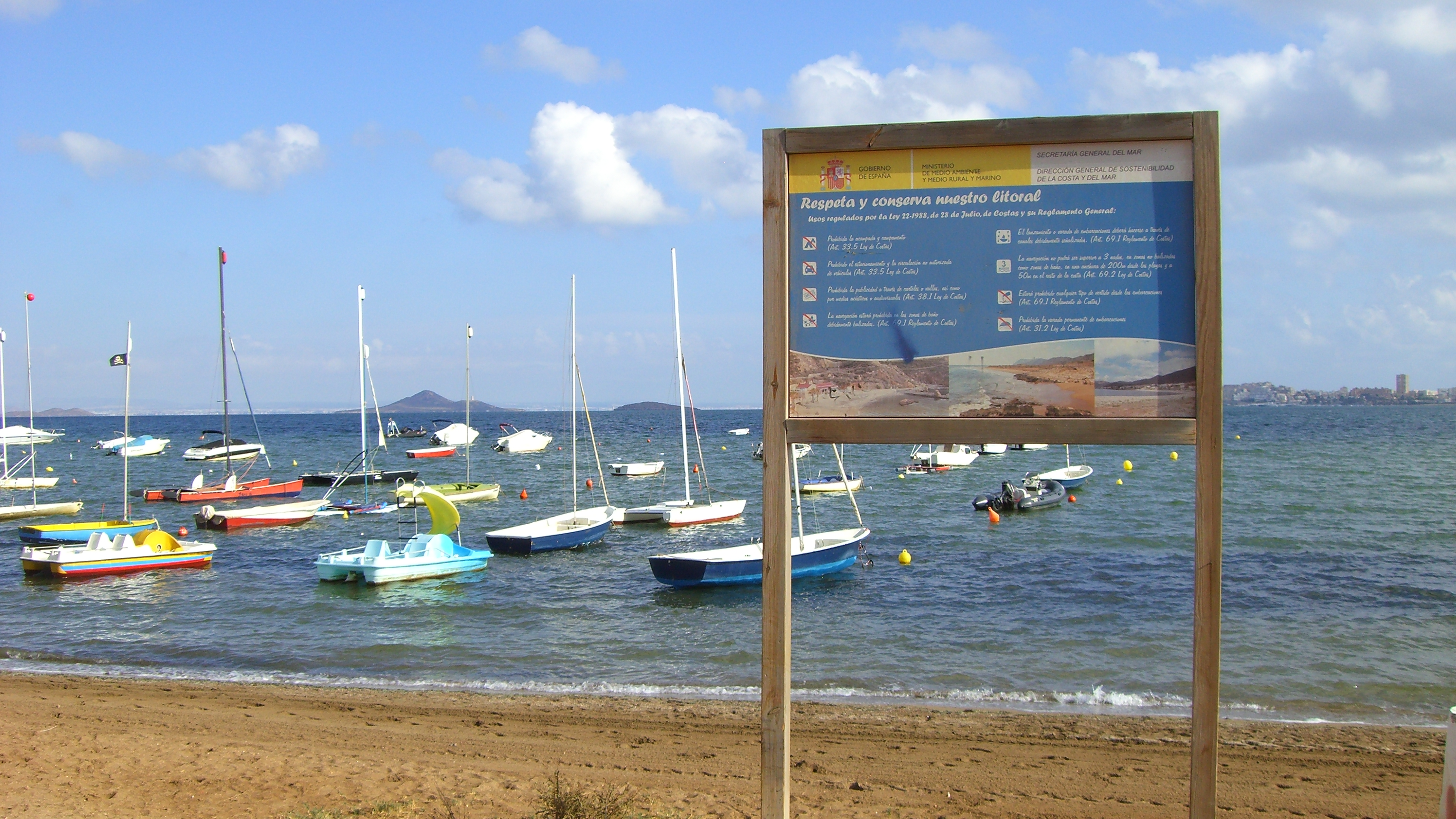 La Manga - Playa de la naturaleza